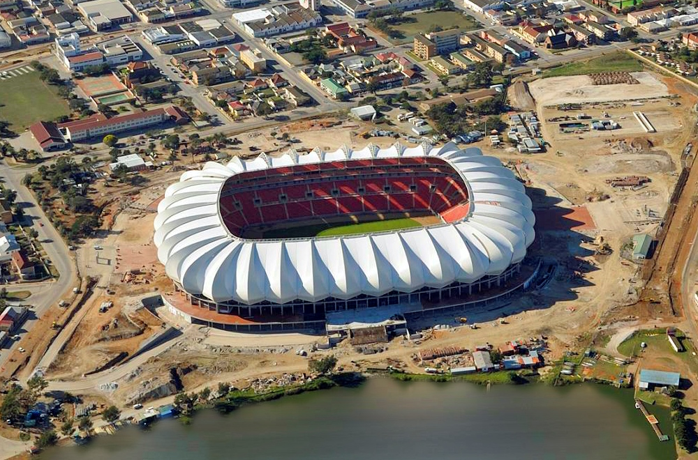 Nelson Mandela Bay Stadium